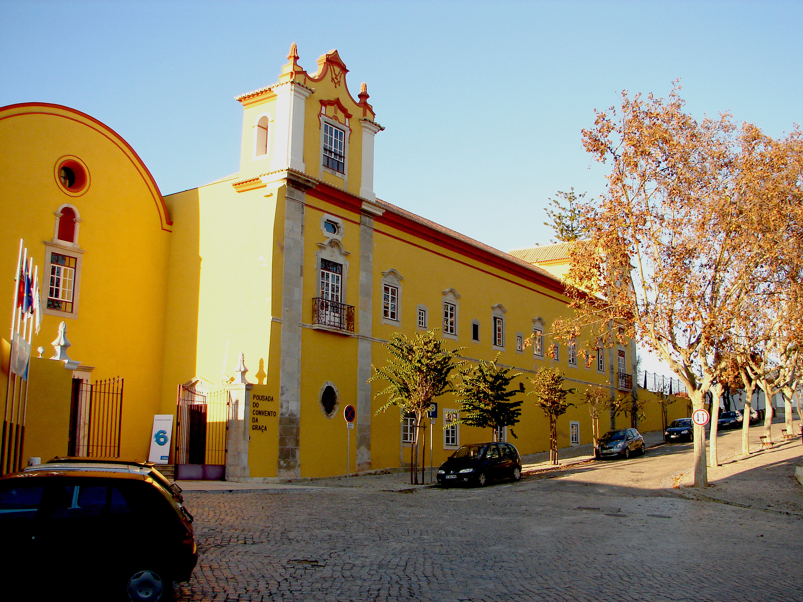 Convento de Nª Srª da Graça do Séc. XVI e transformado em Pousada em 2006.